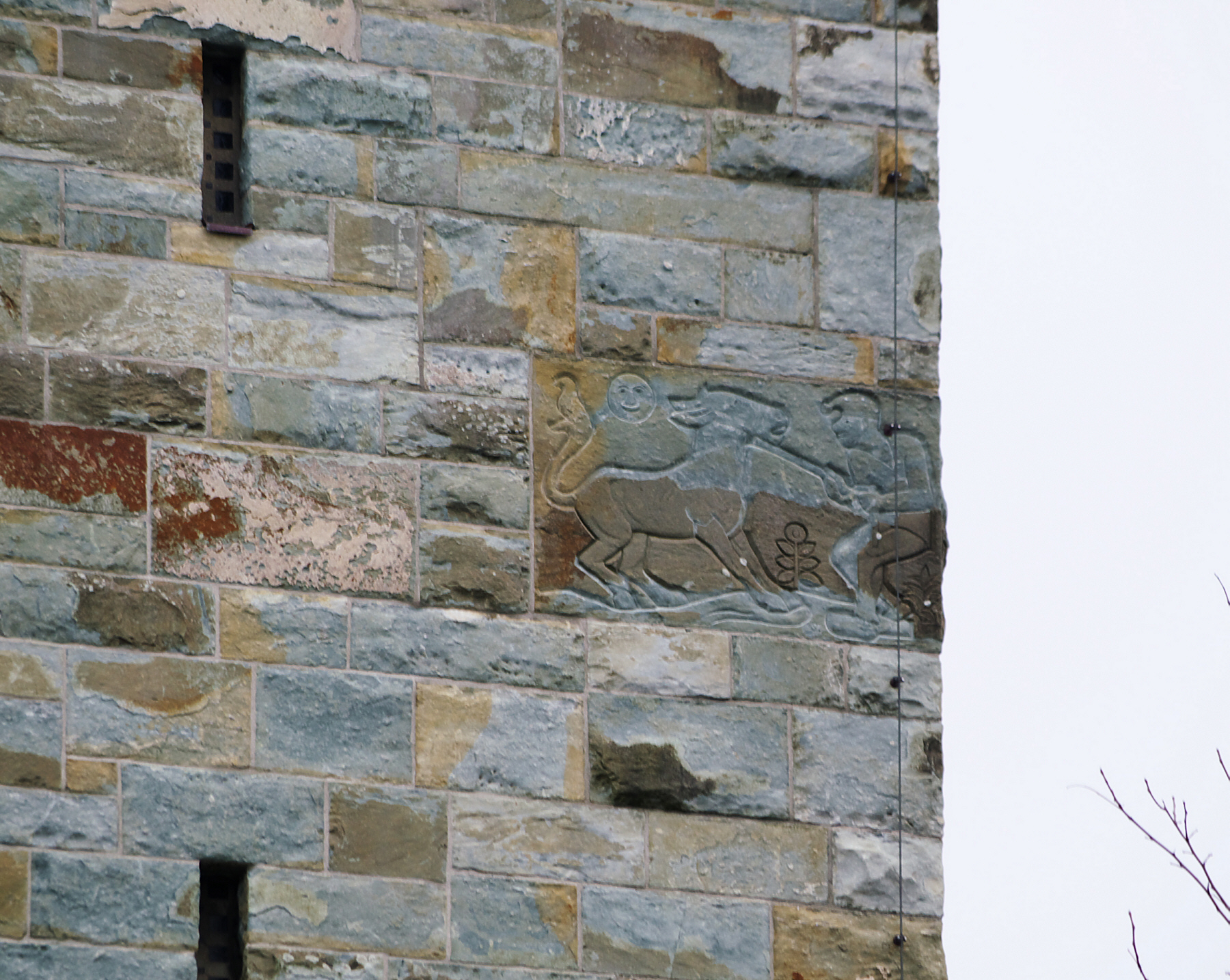 "Iasel Unna", Relief am südlichen Turm der Katharinenkirche in Unna